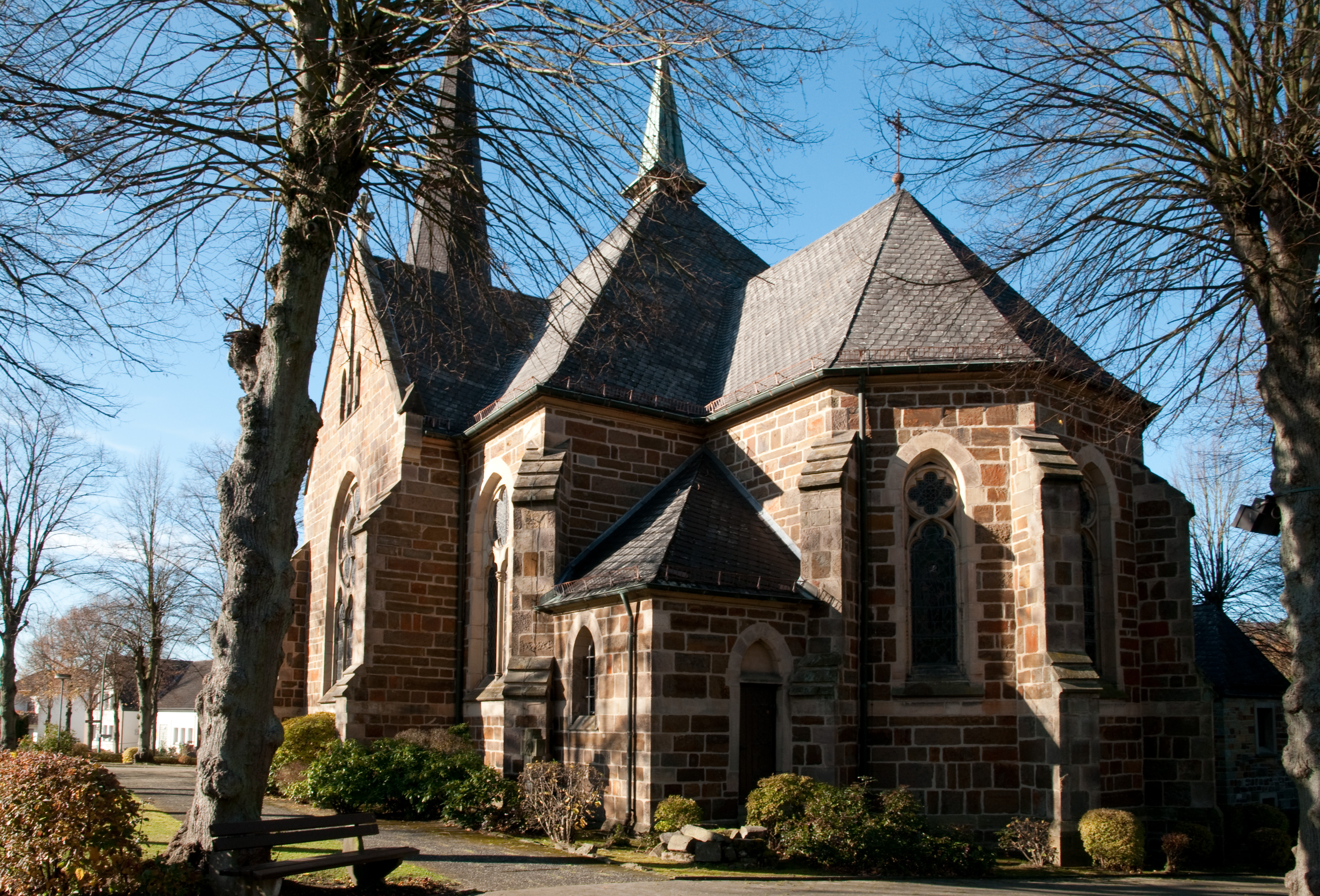 Allagen, Kirche St. Johannes